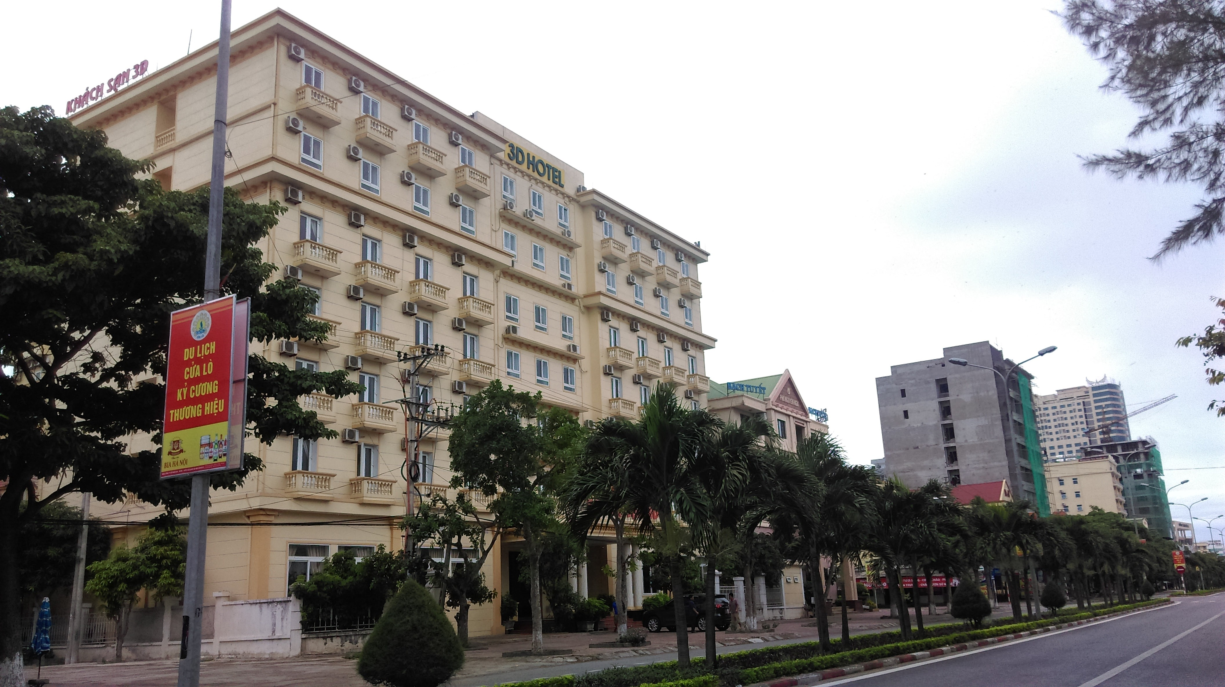 Khách sạn dọc biển Cửa Lò